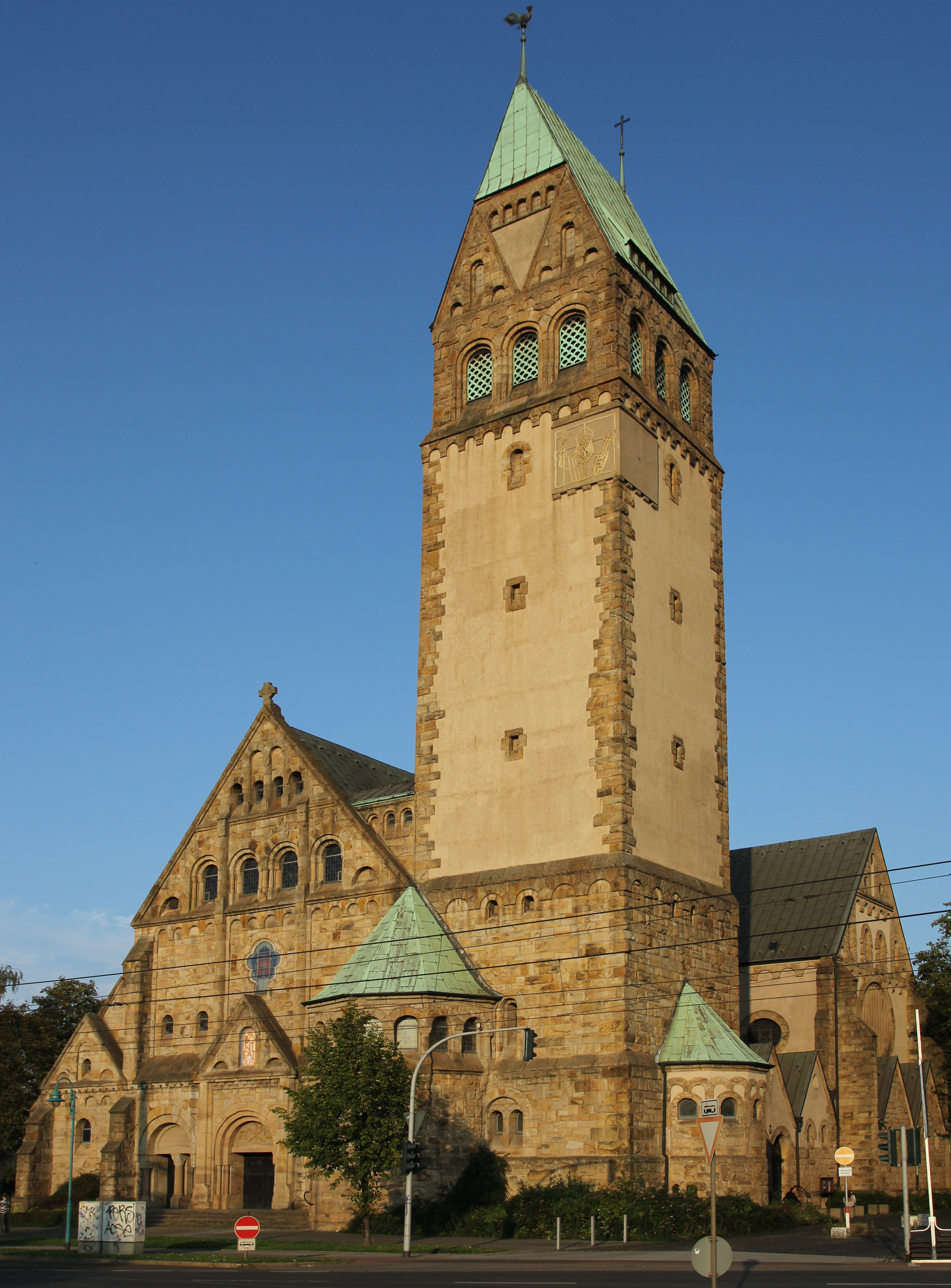 Katholische Pfarrkirche St. Bonifatius in Duisburg-Hochfeld This image shows a heritage building in Germany, located in the North Rhine-Westphalian city Duisburg (no. 37).